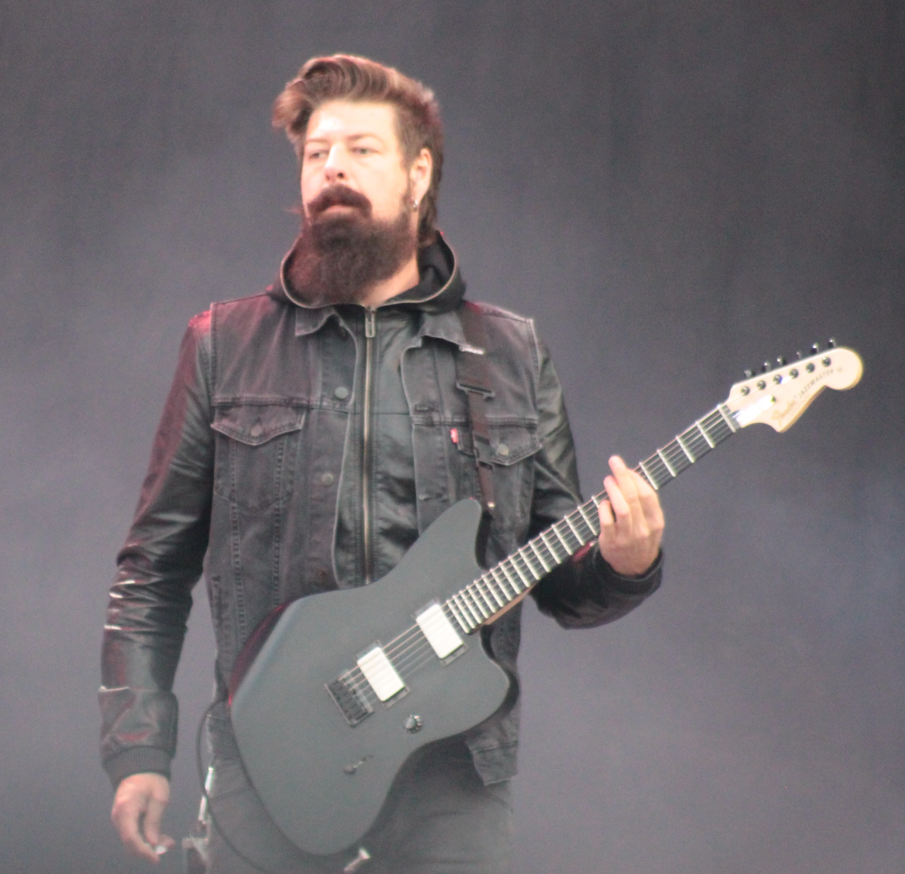 James Root, Stone Sour, Hellfest 2013, Fr-44-Clisson.